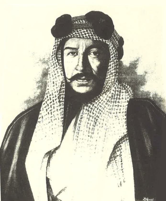 Mubarak Al-Sabah of Kuwait